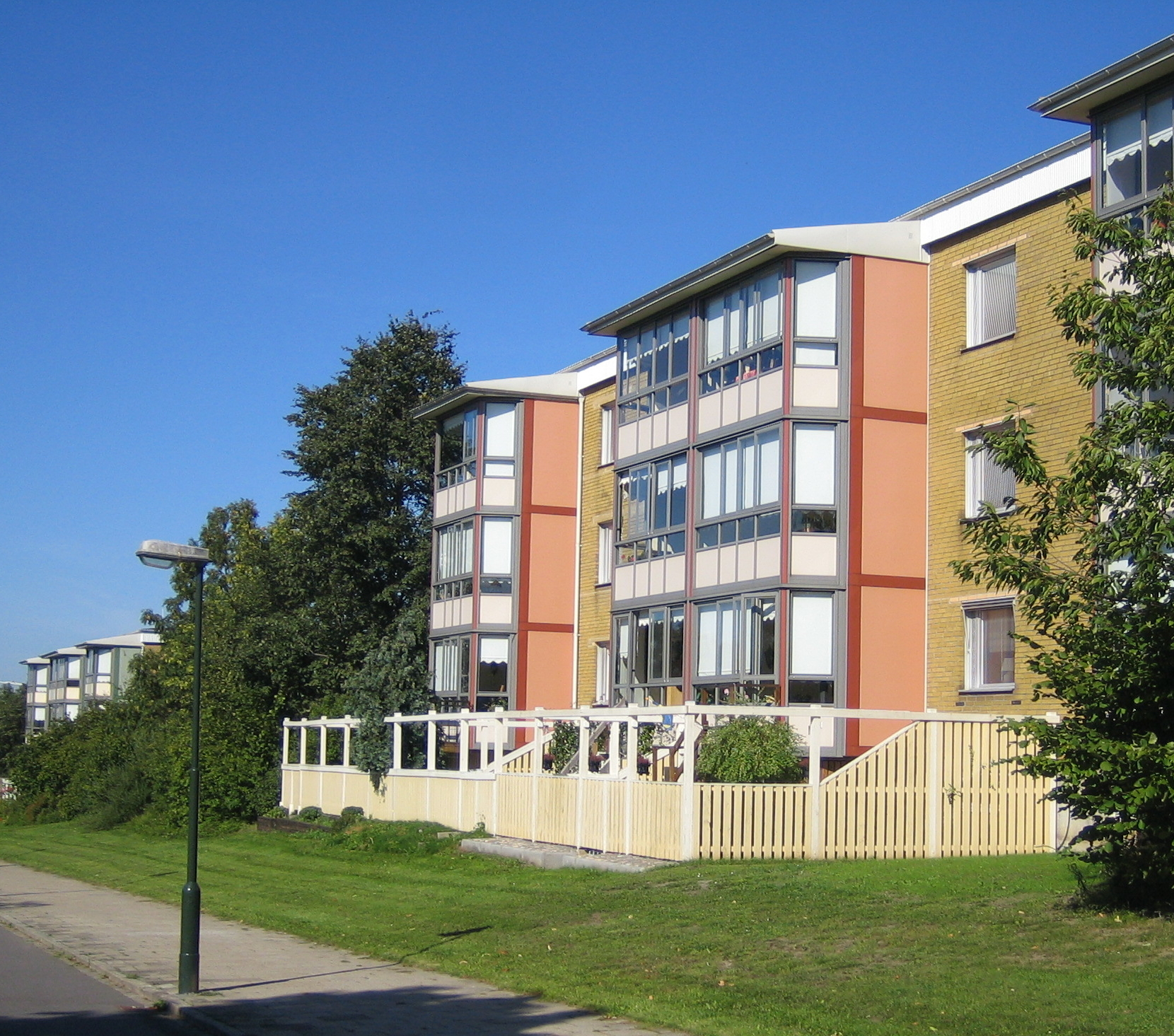 Gula Höja, Malmö, Sweden